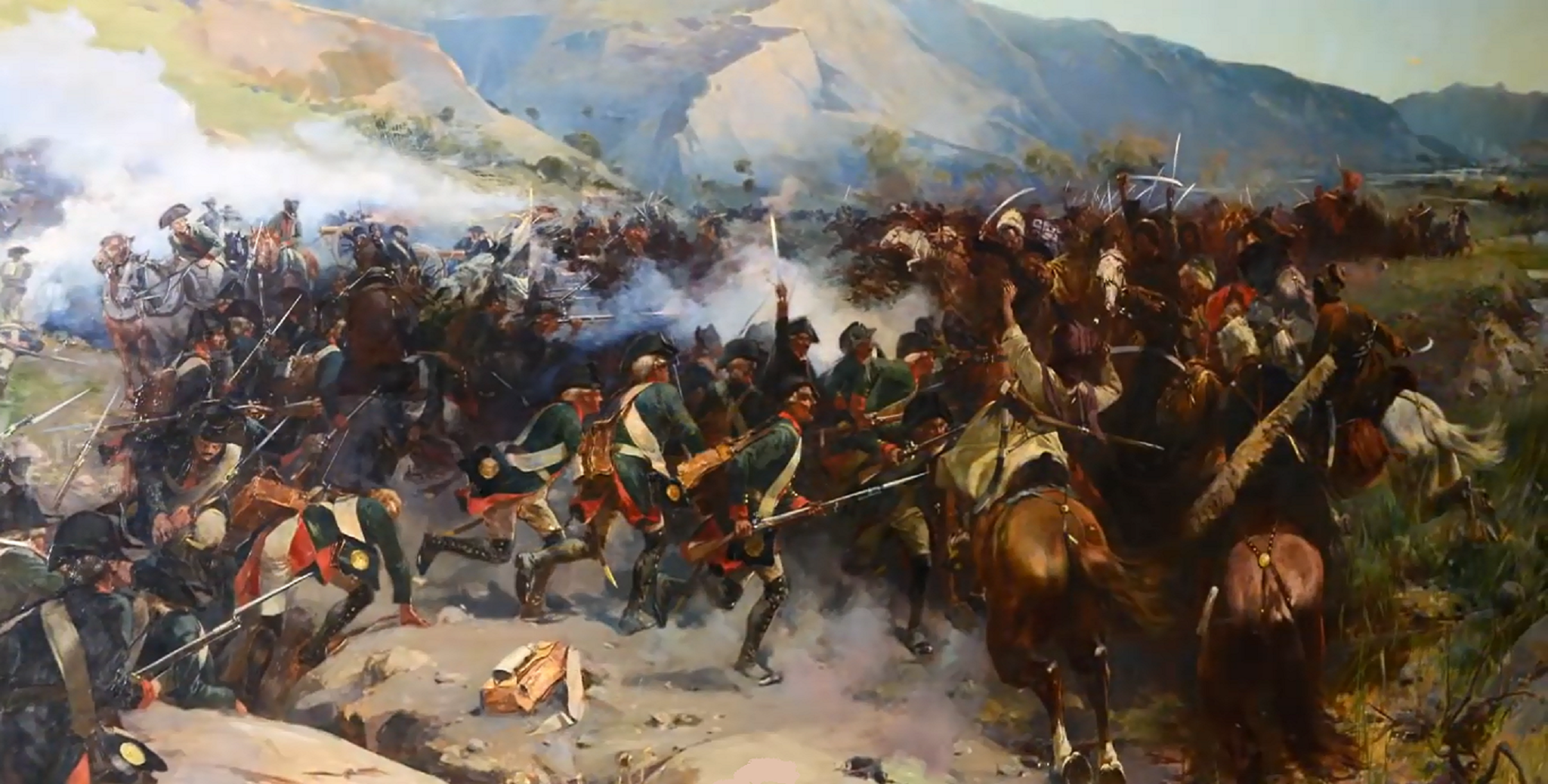 Битва на Иоре 7 ноября 1800 года (Фототипия Н. Димо, Тифлис)